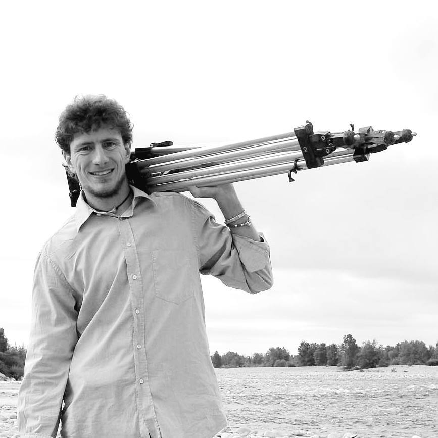 Naturalista, fotografo e divulgatore scientifico